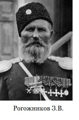 Захар Васильевич Рогожников, войсковой старшина (1909 г.), участник похода 1864, участвовал в походах 1865—1866 гг. и Кокандском походе 1875—1876 гг.